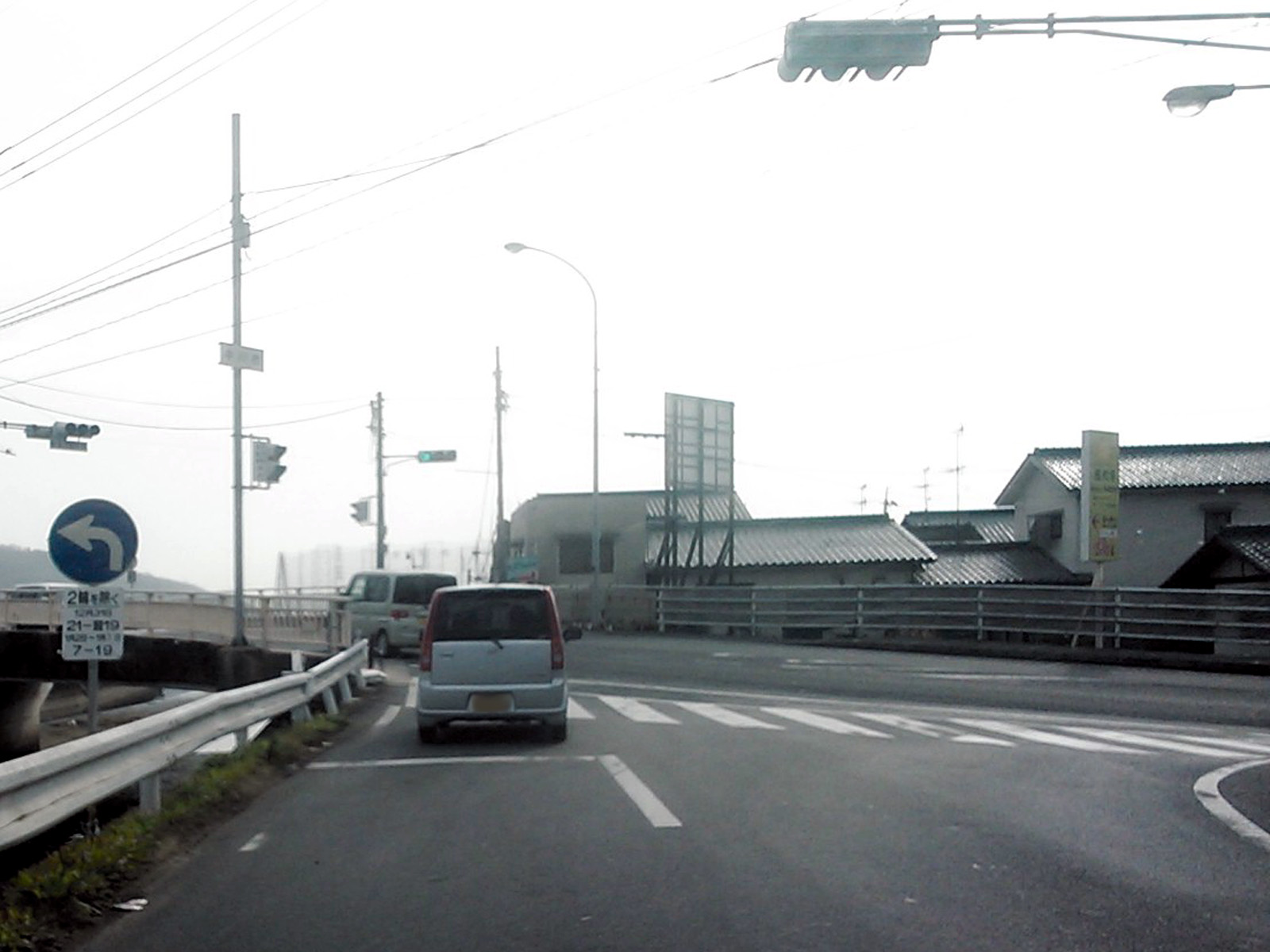 岡山県道61号妹尾御津線、中川橋交差点。御津(辛川市場)側から撮影。12月31日より1月3日までの左折規制標識（常時は撤去されている）が存在する風景。投稿者本人による撮影。